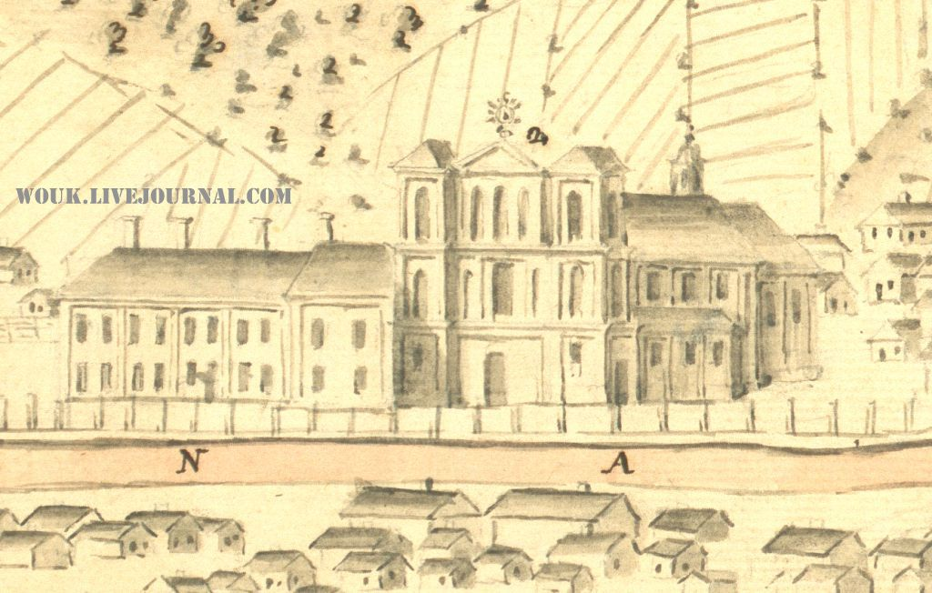 Беларуская (тарашкевіца): Шклоў (Škłoŭ), Старое Места (Staroje Miesta). Касьцёл і кляштар дамініканаў